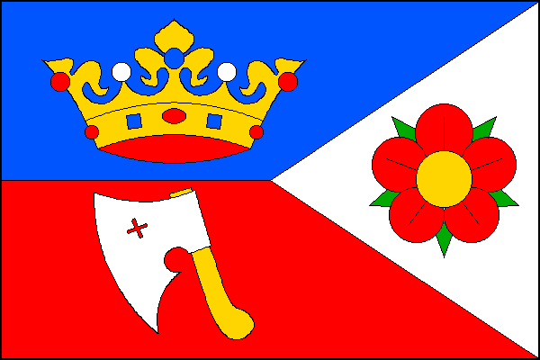 Vlajka obce Kájov